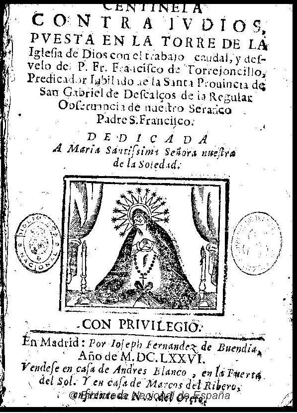 Centinela contra iudios : puesta en la torre de la Iglesia de Dios con el trabajo, caudal y desvelo del P. Fr. Francisco de Torrejoncillo ... de la Regular Obseruancia de ... S. Francisco ... Autor: Francisco de Torrejoncillo (O.F.M.) Fecha: 1676 Datos de edición: En Madrid, por Ioseph Fernandez de Buendia vendese en casa de Andres Blanco ... y ... de Marcos del Ribero ...